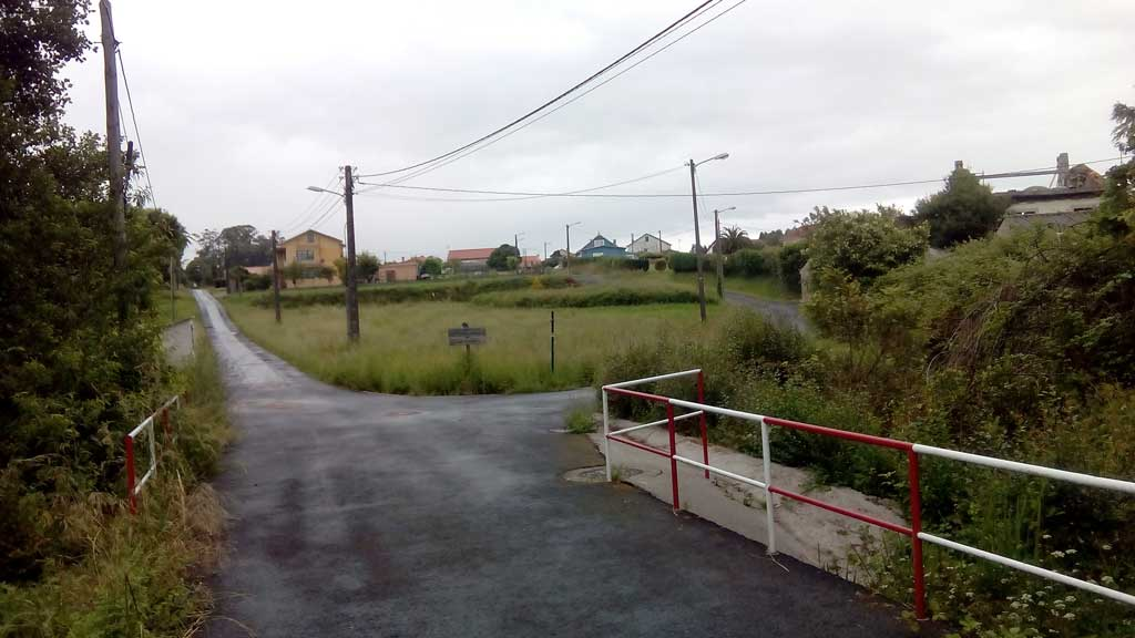 A Barcia, Trasancos.